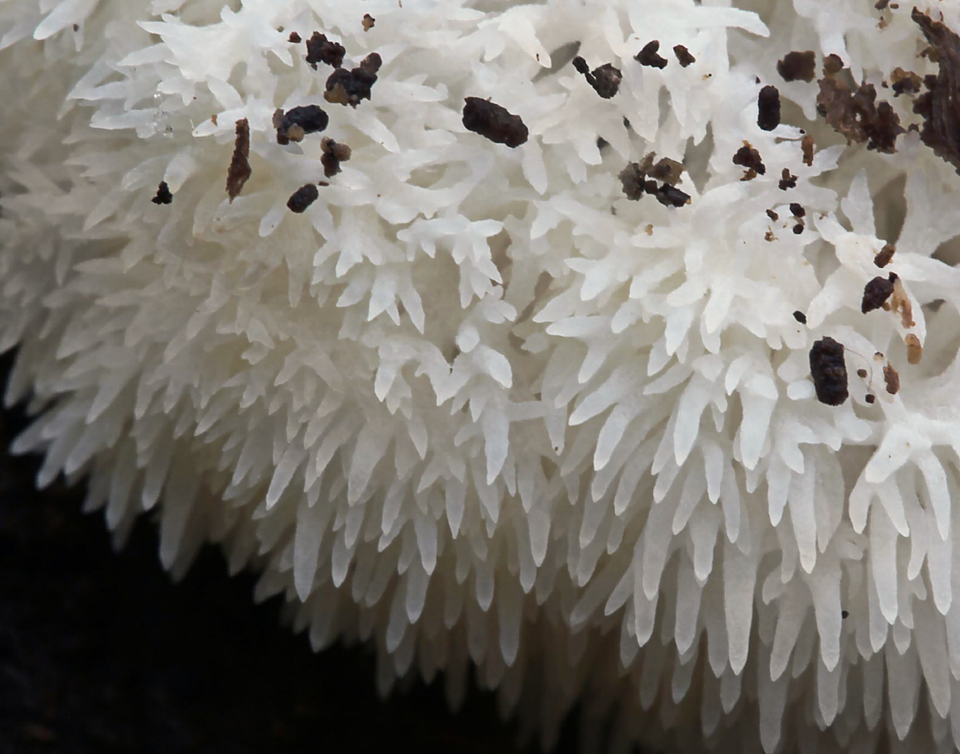 Hericium erinaceus (Bull.) Pers.